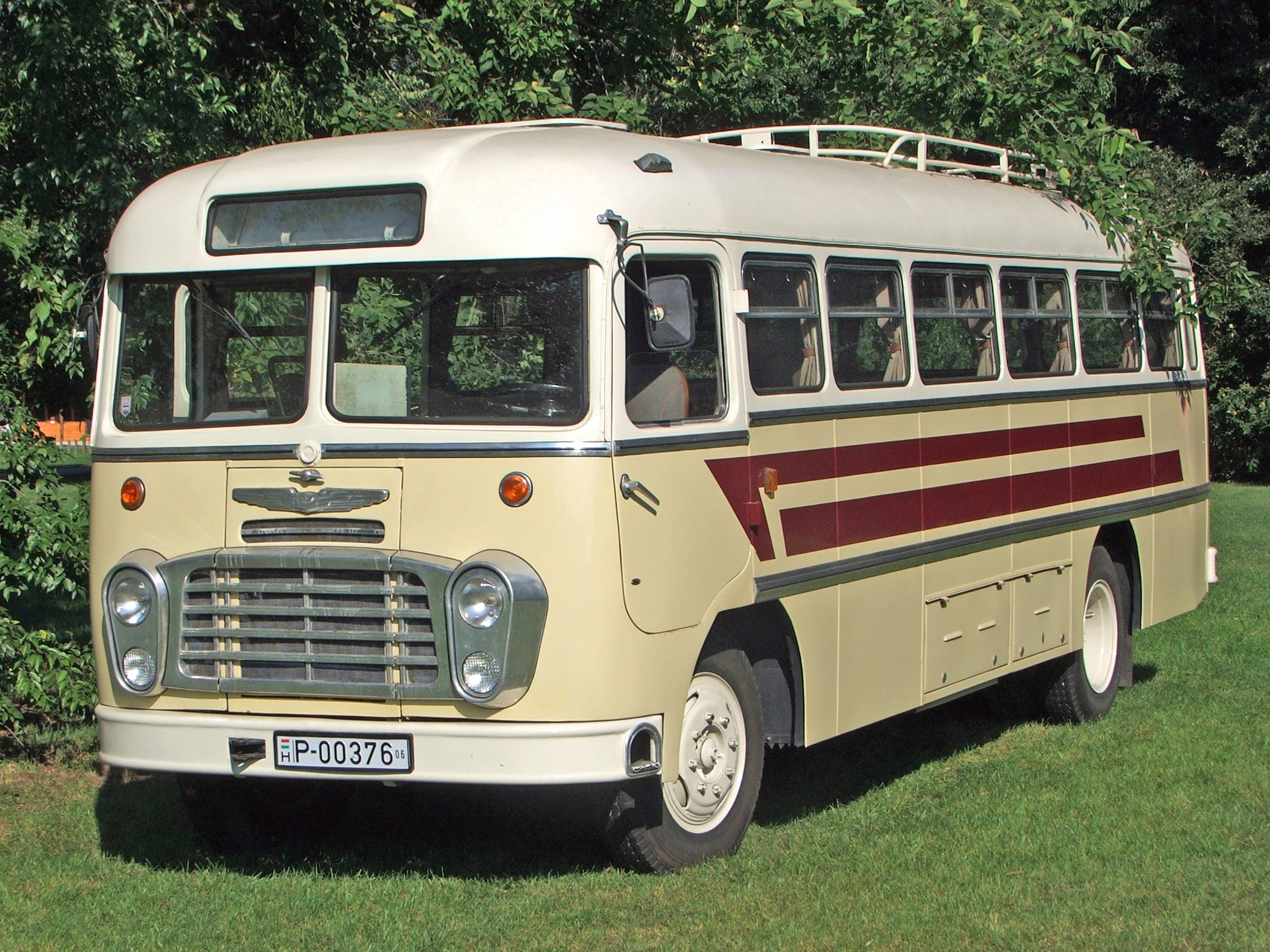 Ikarus 31 at the Ikarus meeting in Tata, Hungary.